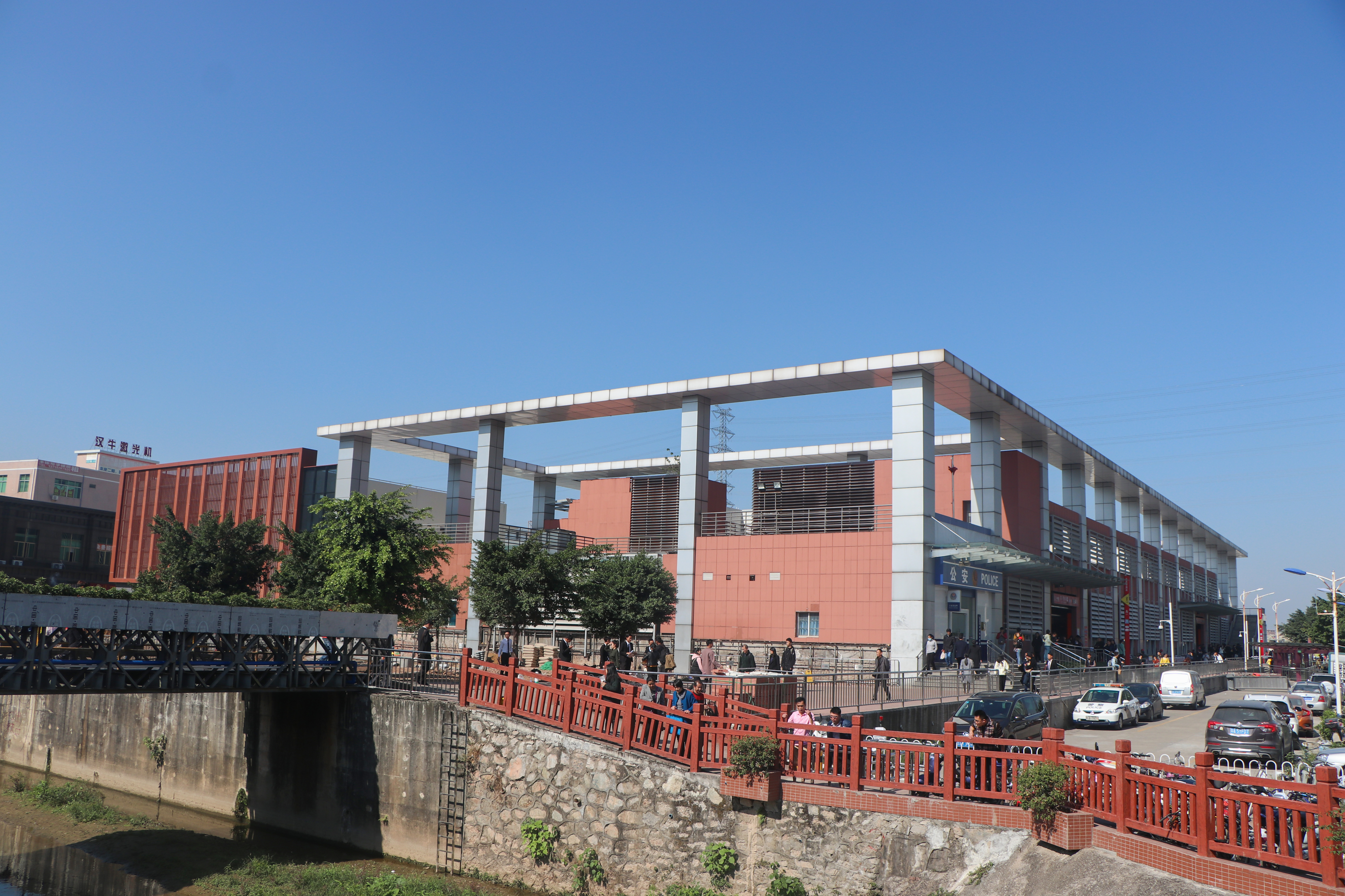 广州地铁嘉禾望岗站